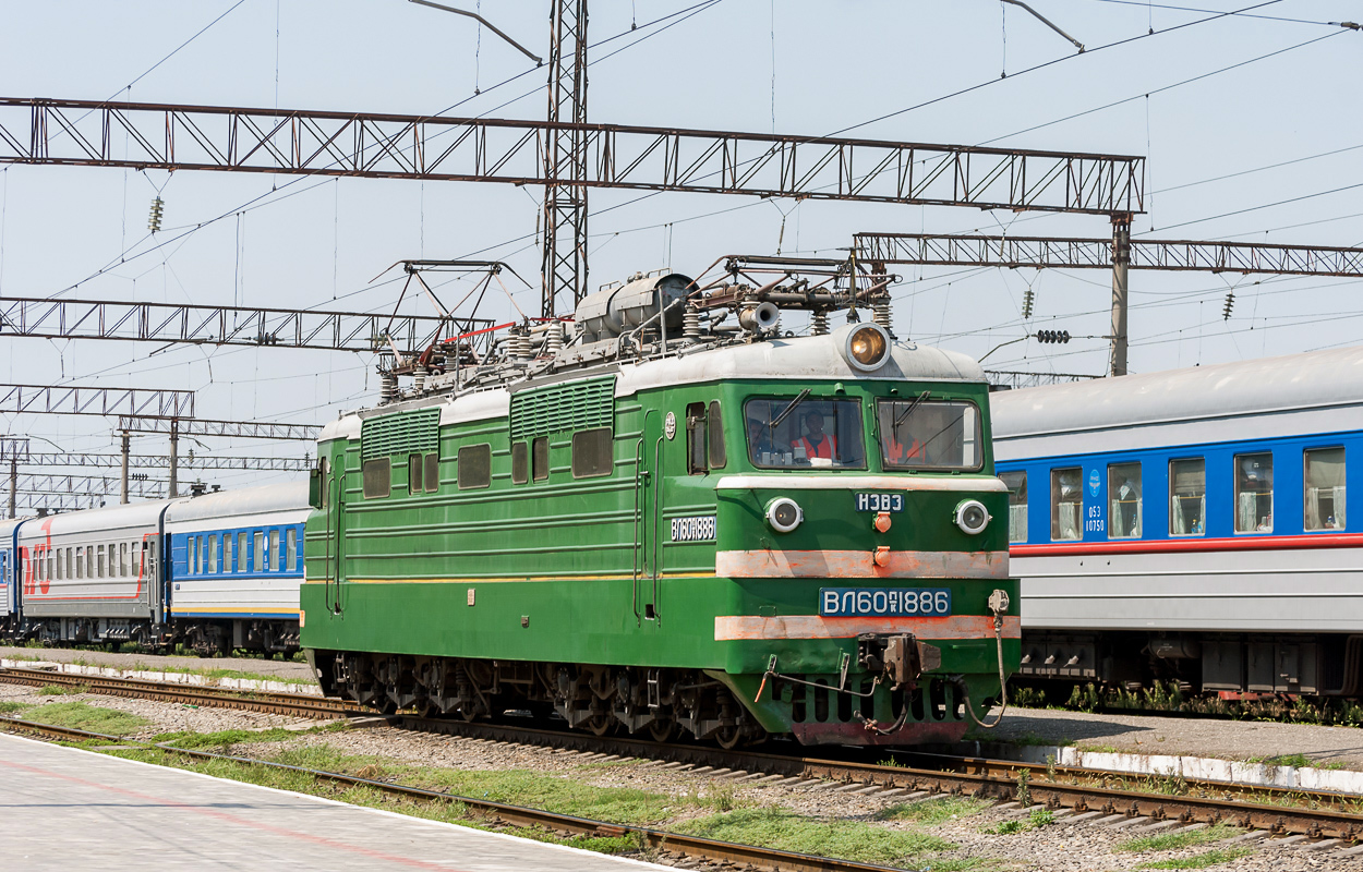 КР 11.2004 г.